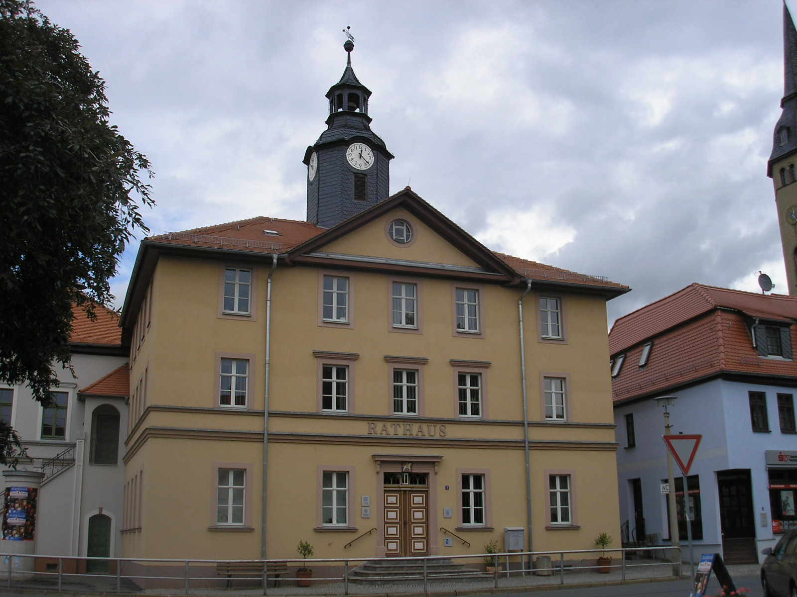 Das Rathaus von Bürgel (Thüringen).